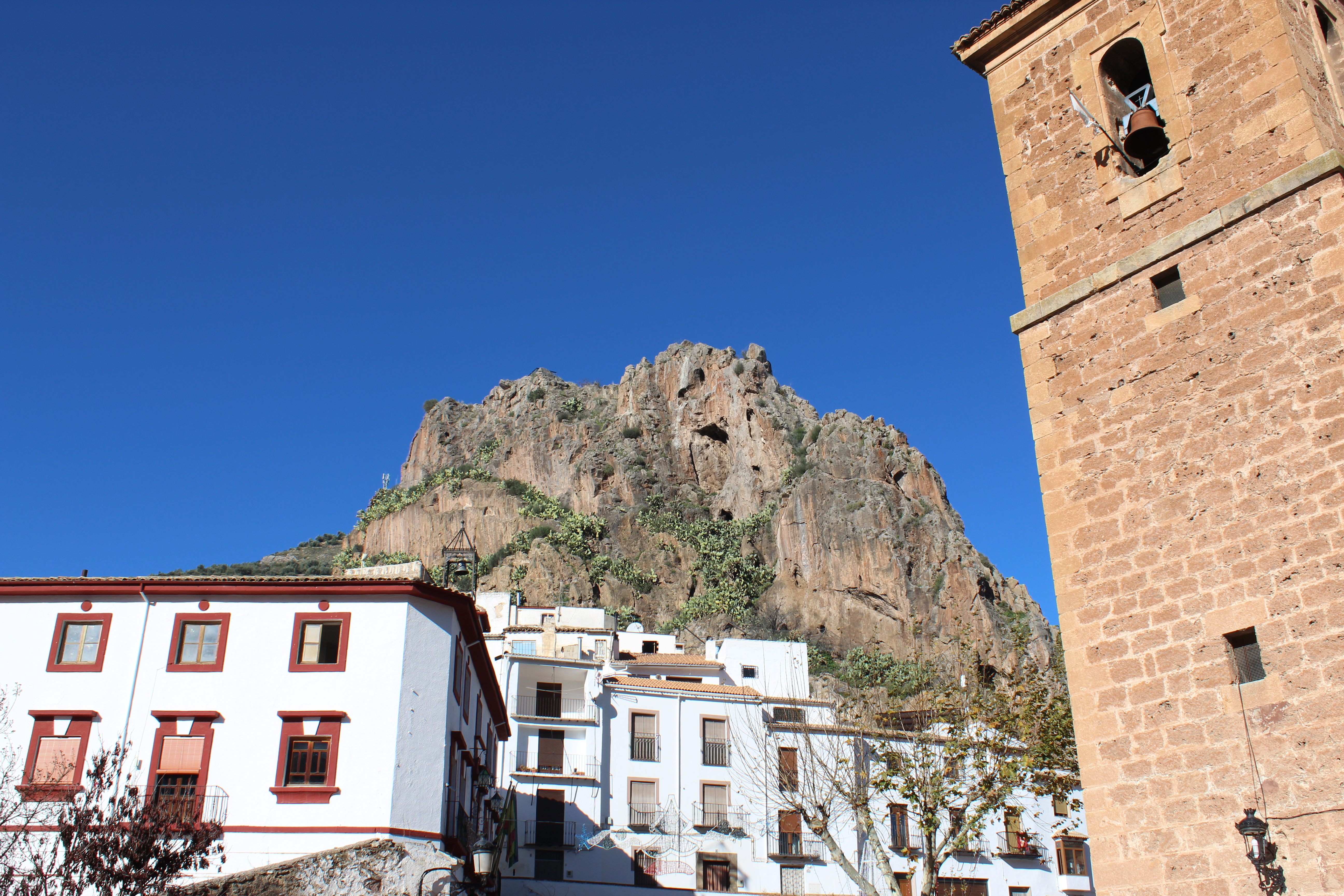 Castillo de Cambil y torre de la iglesia de Cambil.